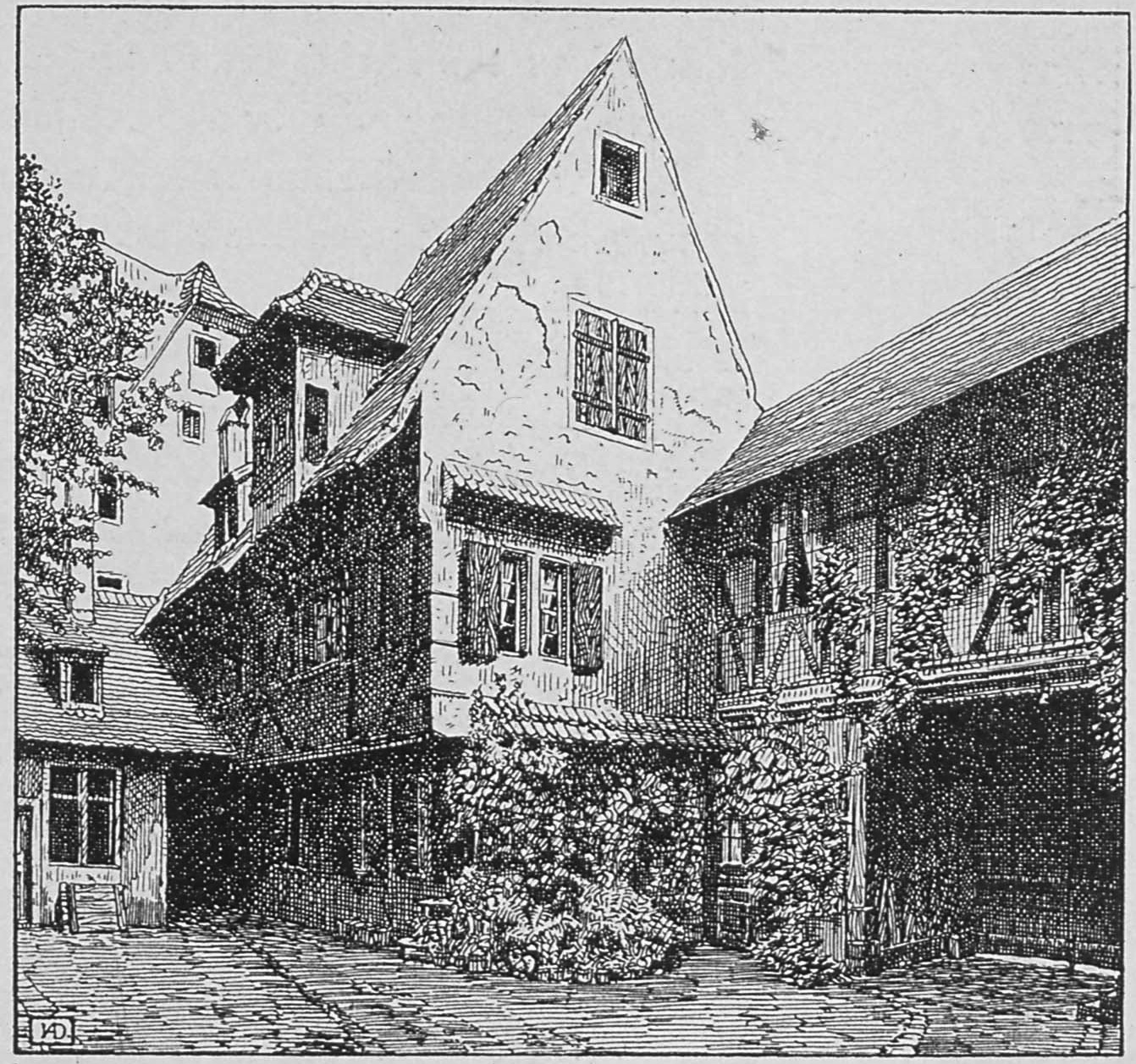 Place Saint-Thomas, la cour intérieur de la Maison Capiton (1902)